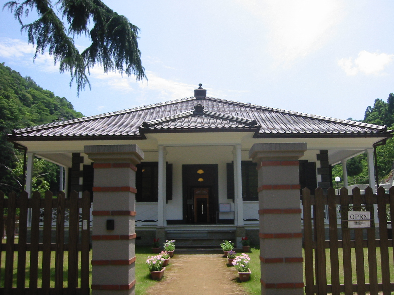 朝来市ムーセ邸にて。